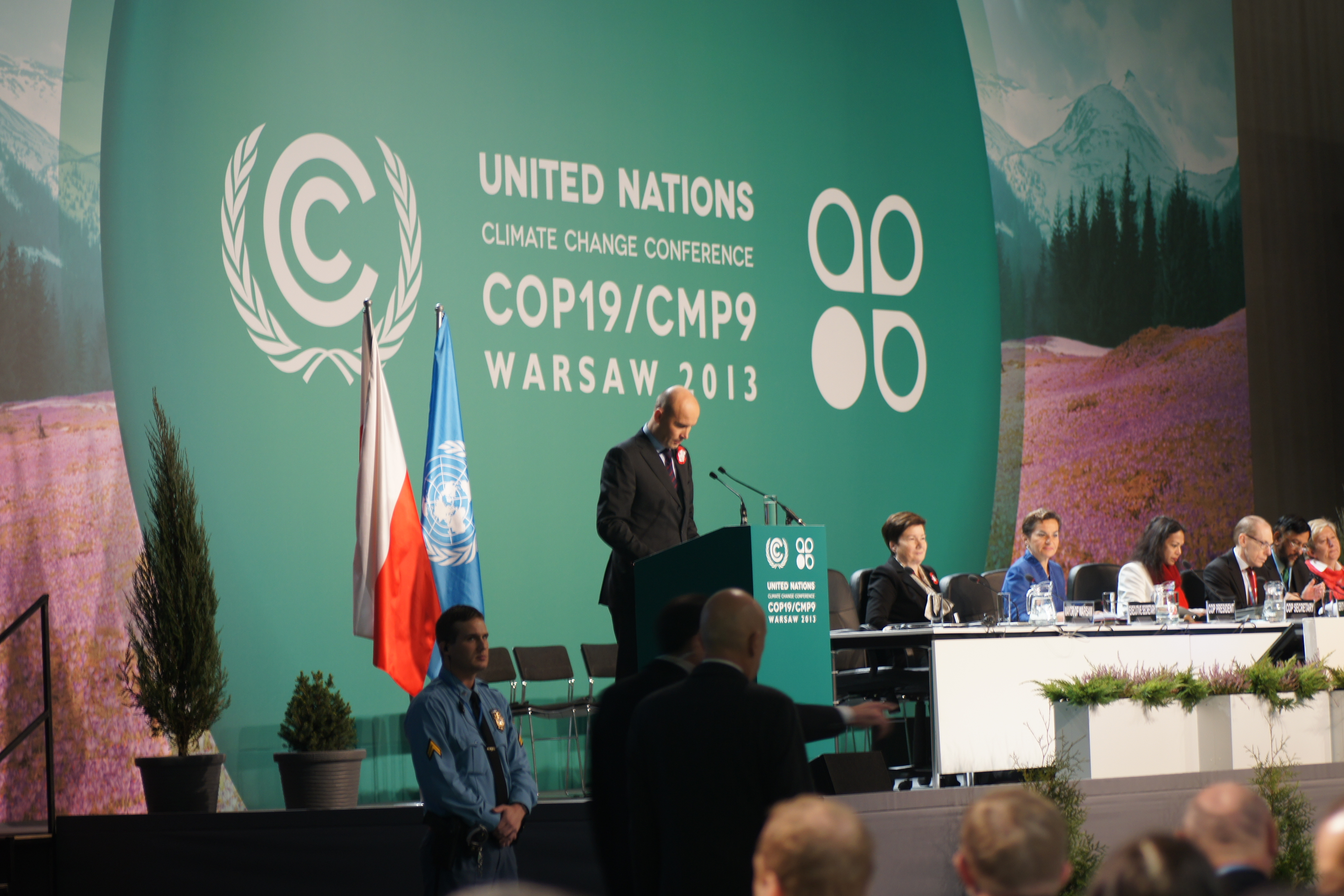 COP19 at National Stadium